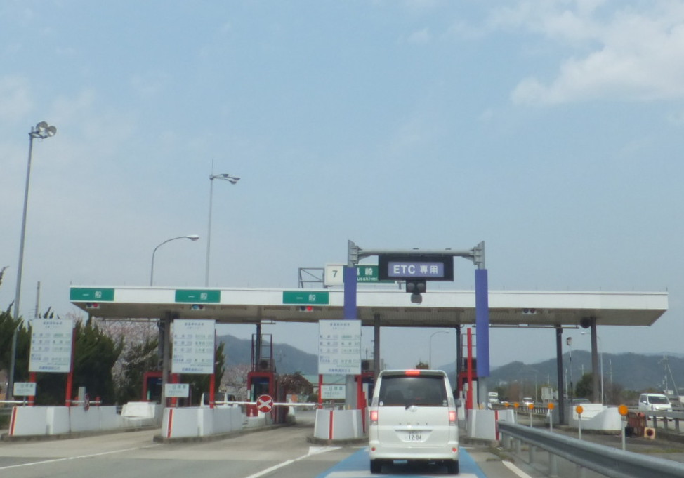 福崎南ランプ